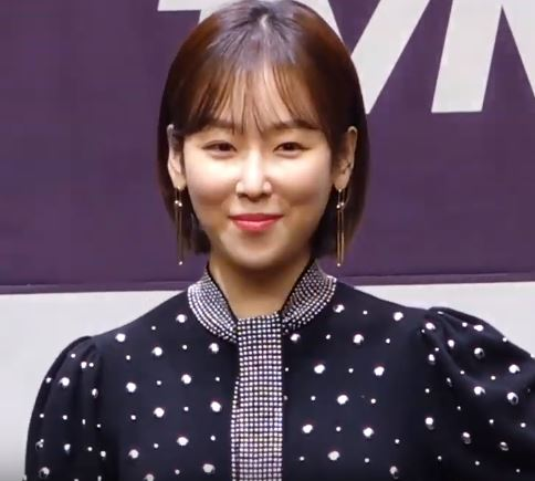 tvN 새 월화드라마 '블랙독' 제작발표회가 11일 오후 서울시 구로구 신도림 라마다호텔에서 열렸다.